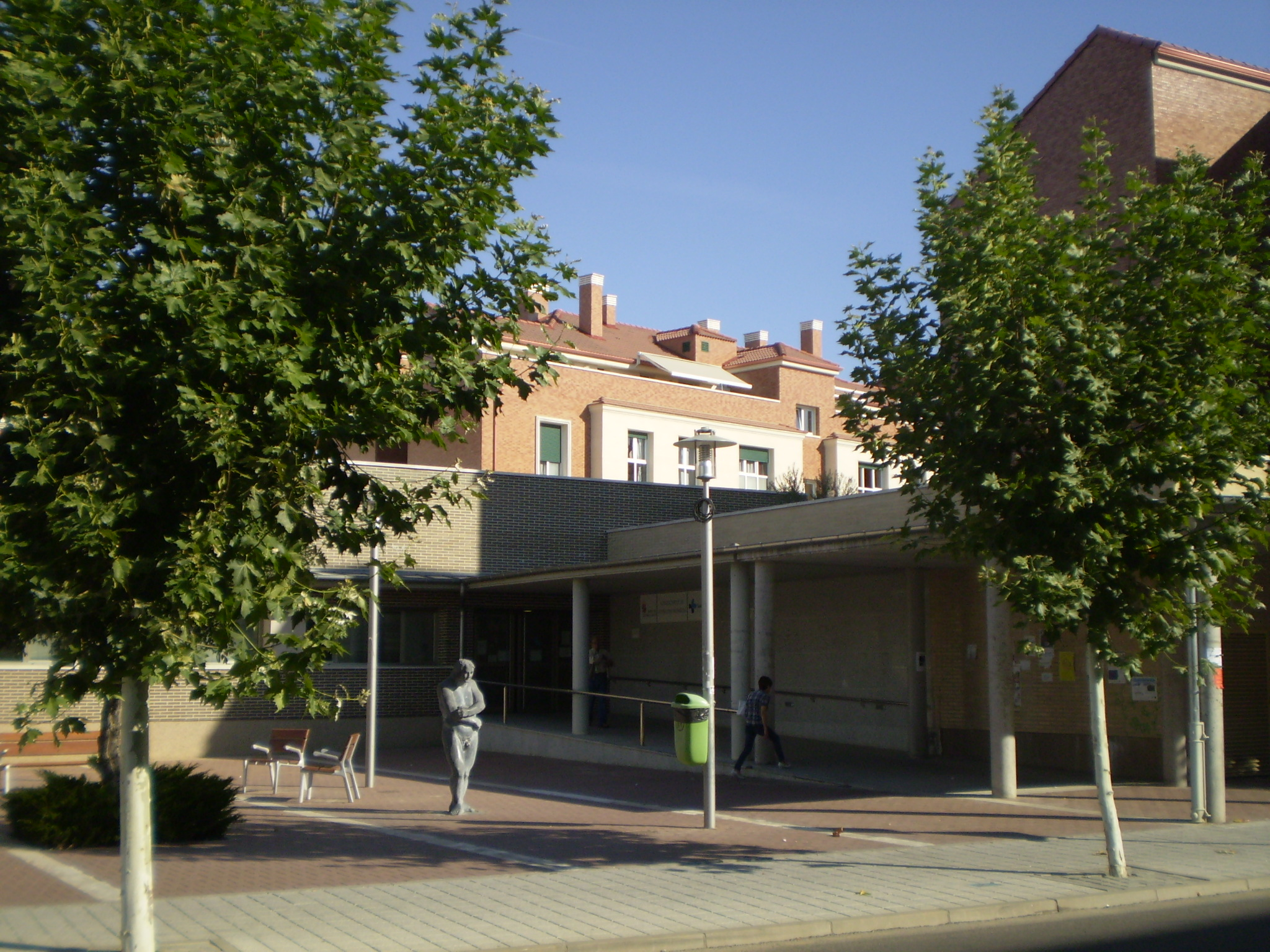 centro de salud la cisterniga valladolid españa